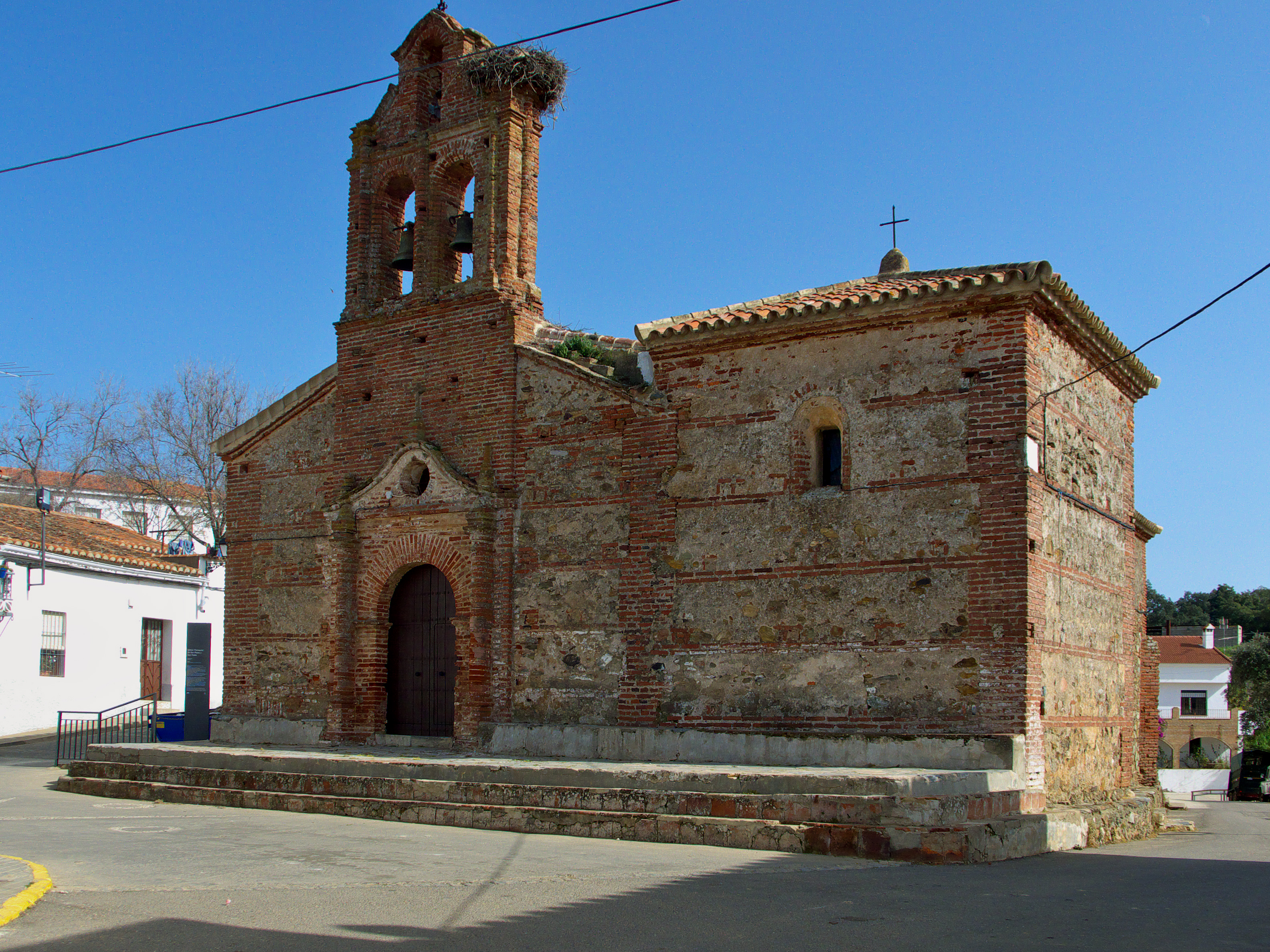 Fachada principal (ss. XV y XVI)